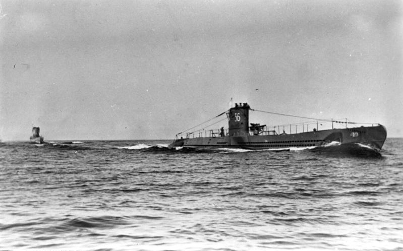 U-Boot U 36 Unterseeboot U-36, Typ VII A